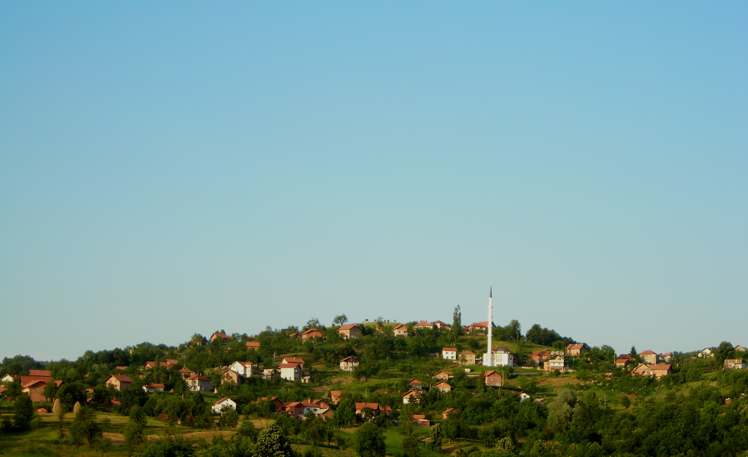 Dio sjenjanske panorame sa novoizgrađenom džamijom.